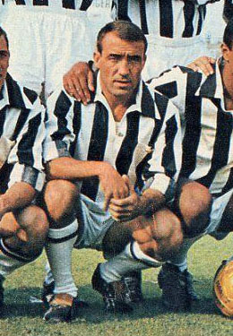 Il calciatore spagnolo Luis del Sol Cascajares alla Juventus nella stagione 1963-64.